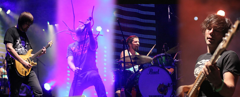 es un trabajo sobre fou